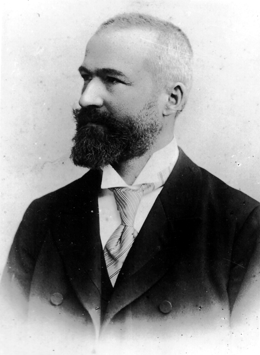 Aufnahme im Jahr 1900